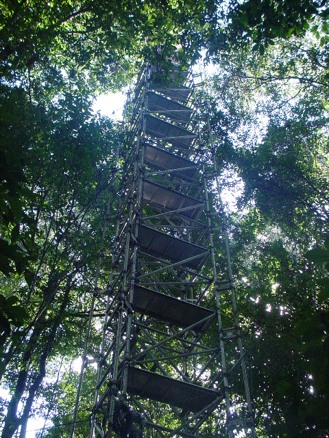 Torre Micrometeorológica instalada na floresta nacional de caxiuanã, município de MElgaço, Pará.